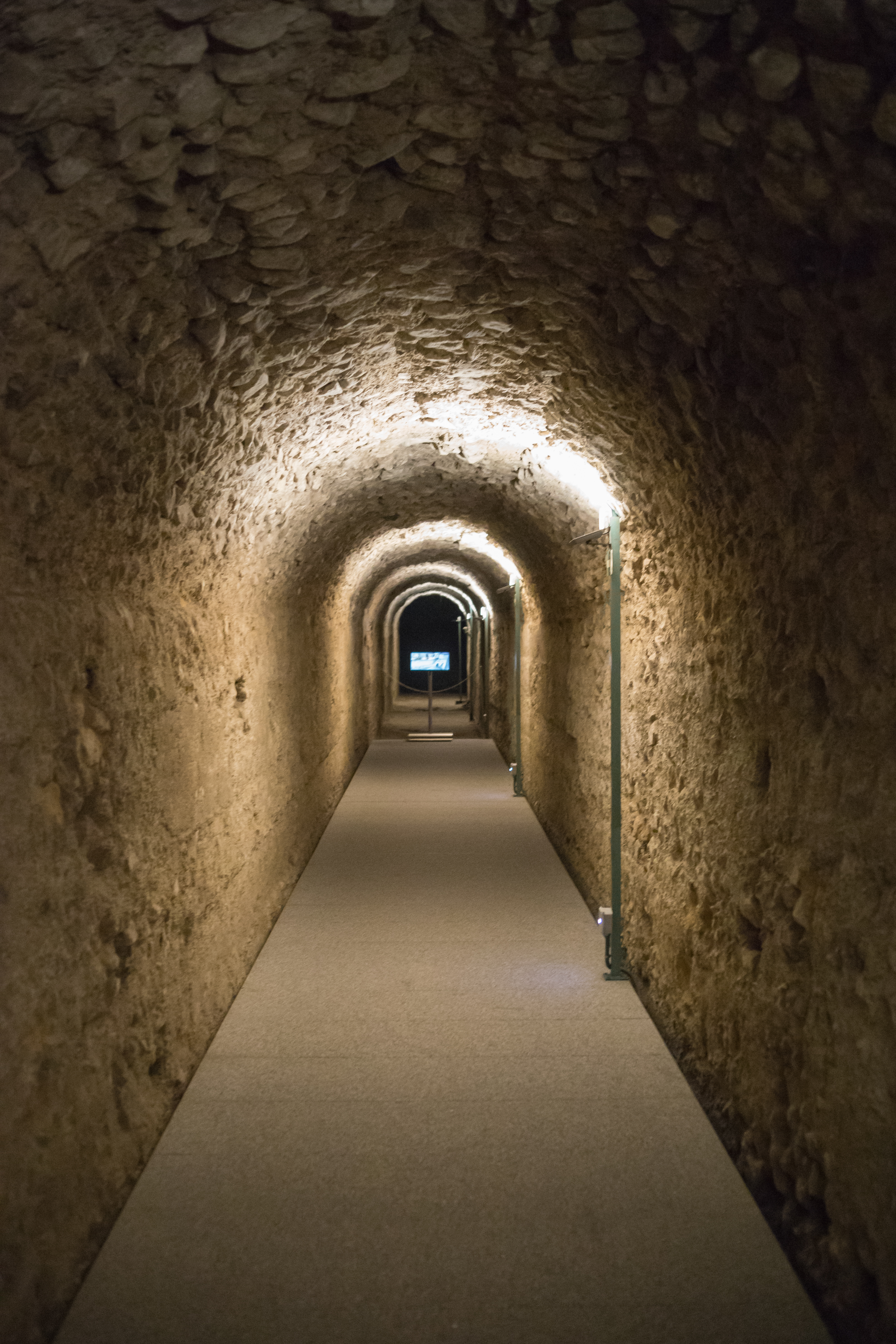 Cloacas en el Museo del Foro del Museo de Cesaraugusta